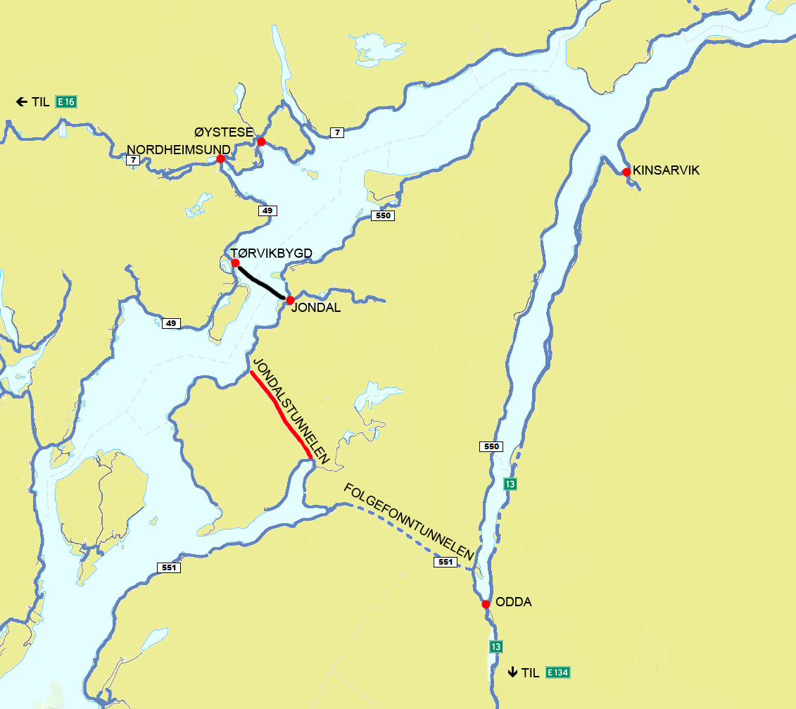 Kart som viser Jondalstunnelen i Kvinnherad og Jondal kommuner.